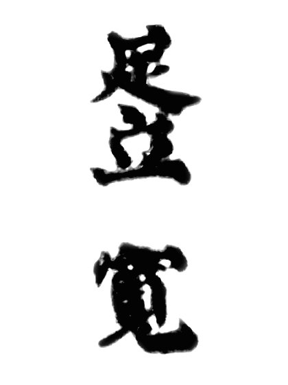 足立寛・陸軍軍医学校校長のサイン